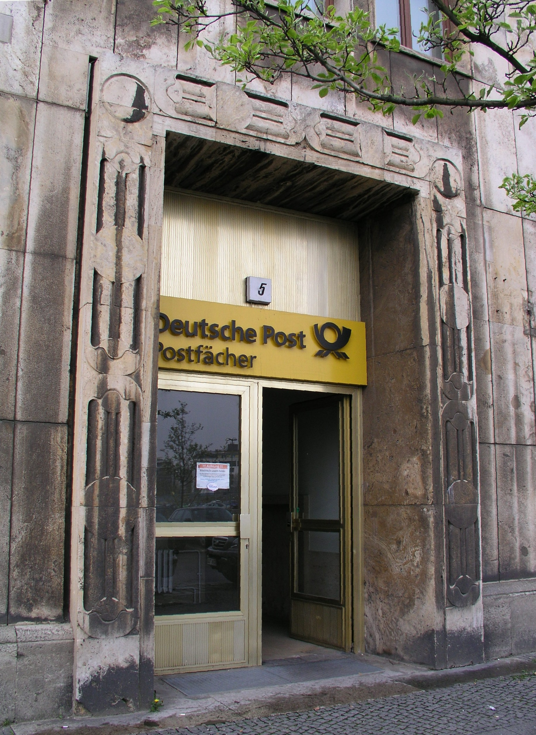 Eingangsbereich des Postamtes am Nordbahnhof